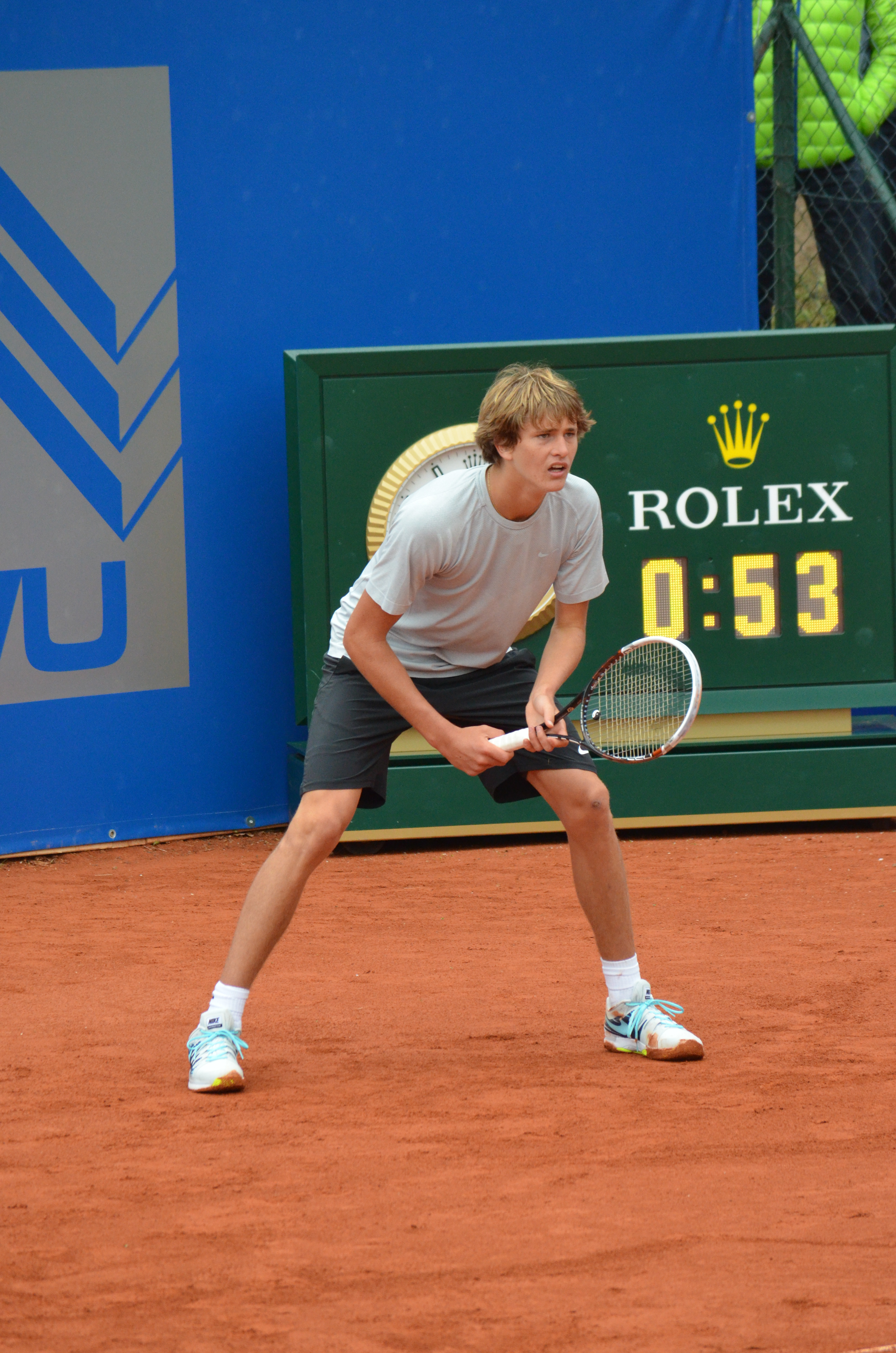 Alexander Zverev in der Begegnung gegen Jürgen Melzer bei den BMW Open 2014